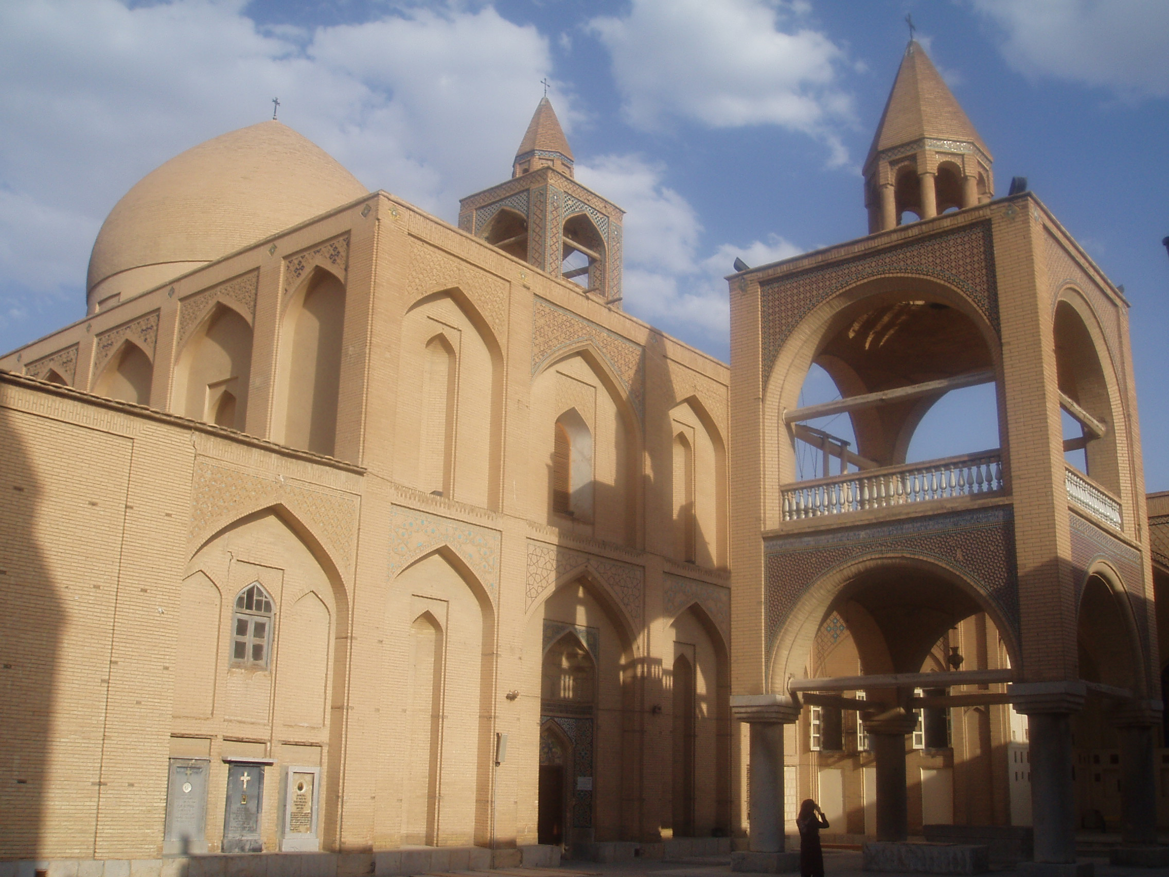 Նոր Ջուղայի Վանքը, Սպահան - Իրան